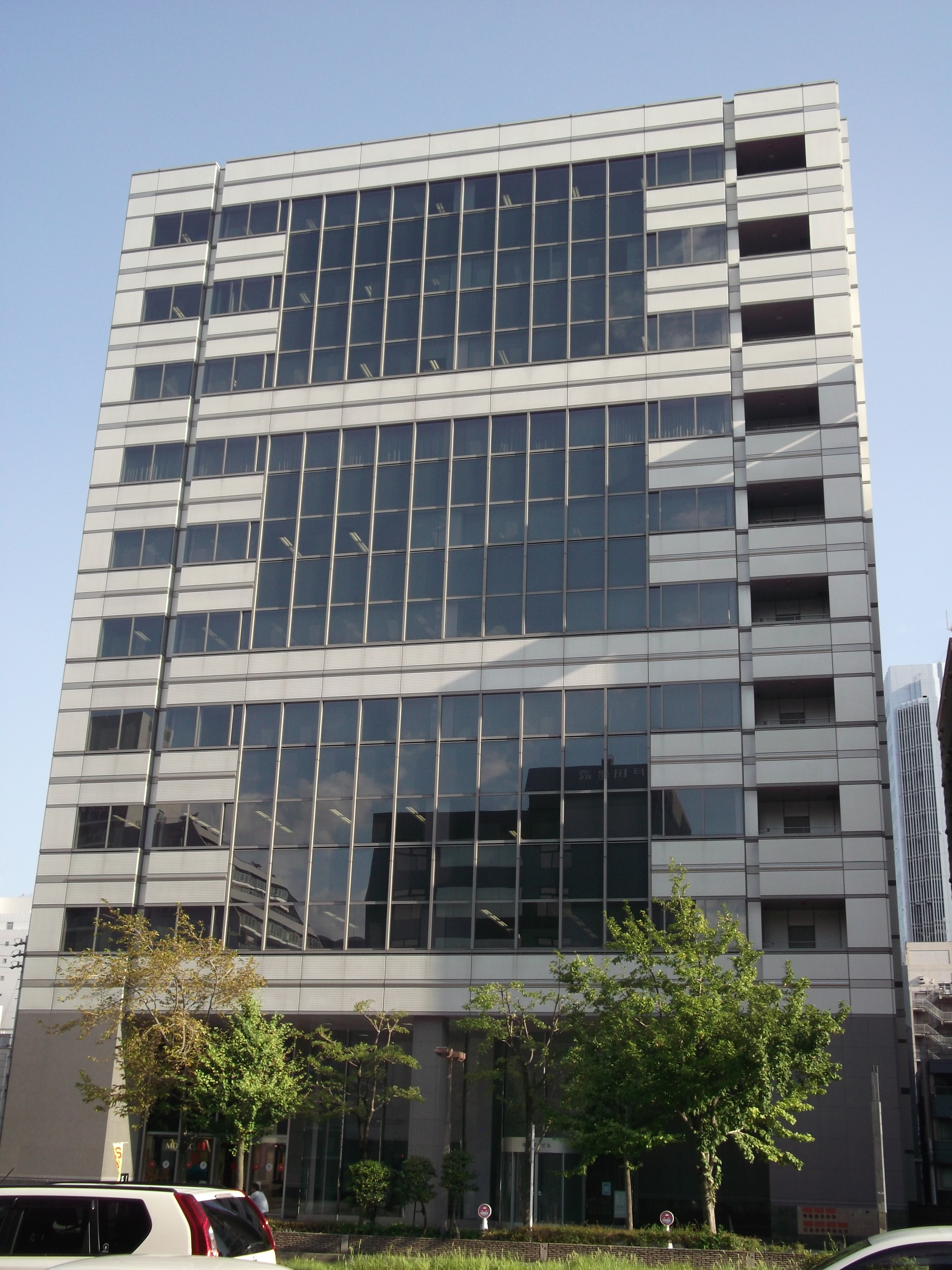 名古屋市東区東桜の東桜第一ビルを北側公道より撮影